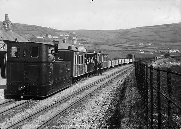 Train on the Glyn Valley Tramway, at Glyn Ceiriog, Wales